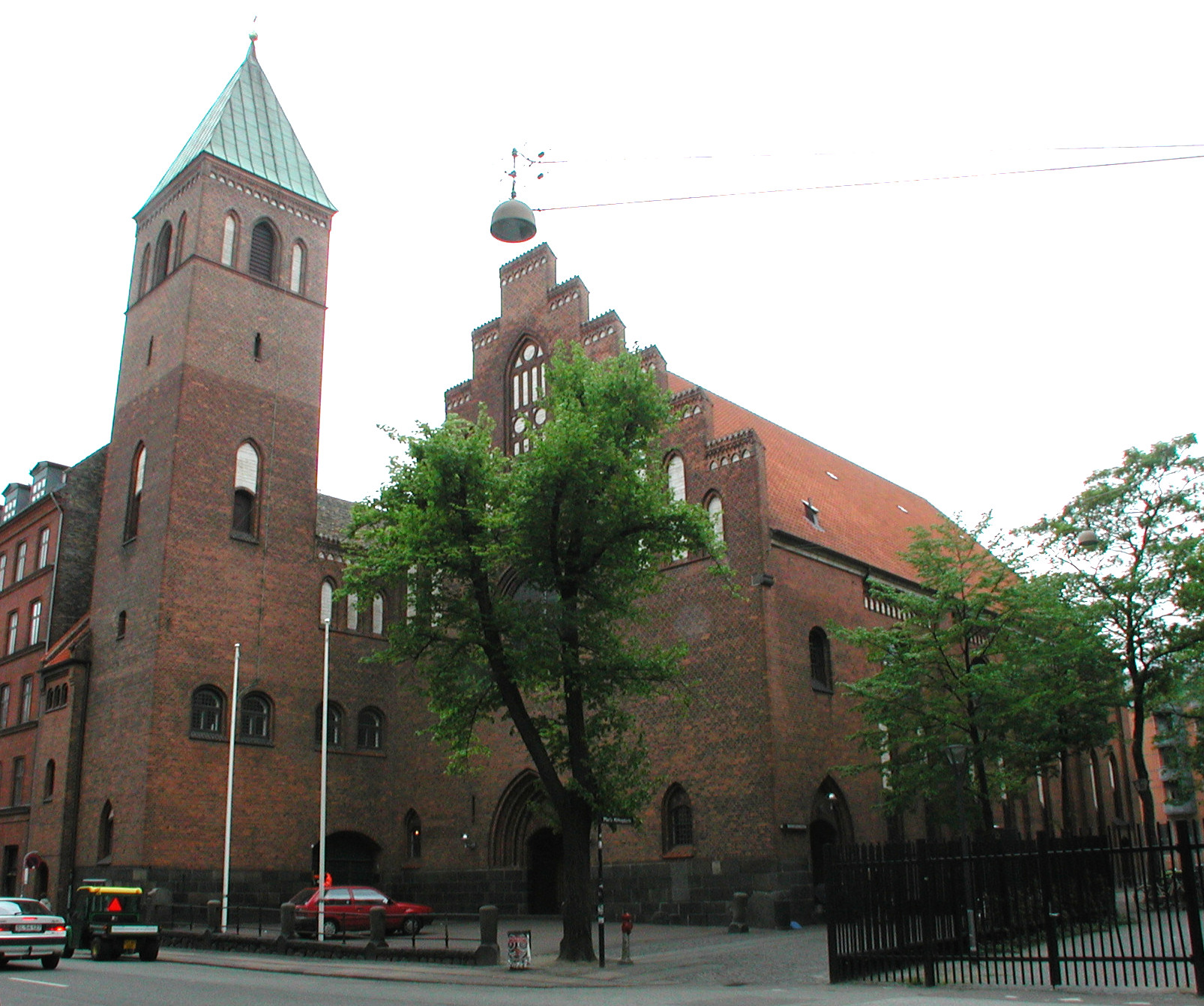 Mariakirken in Copenhagen, Denmark.